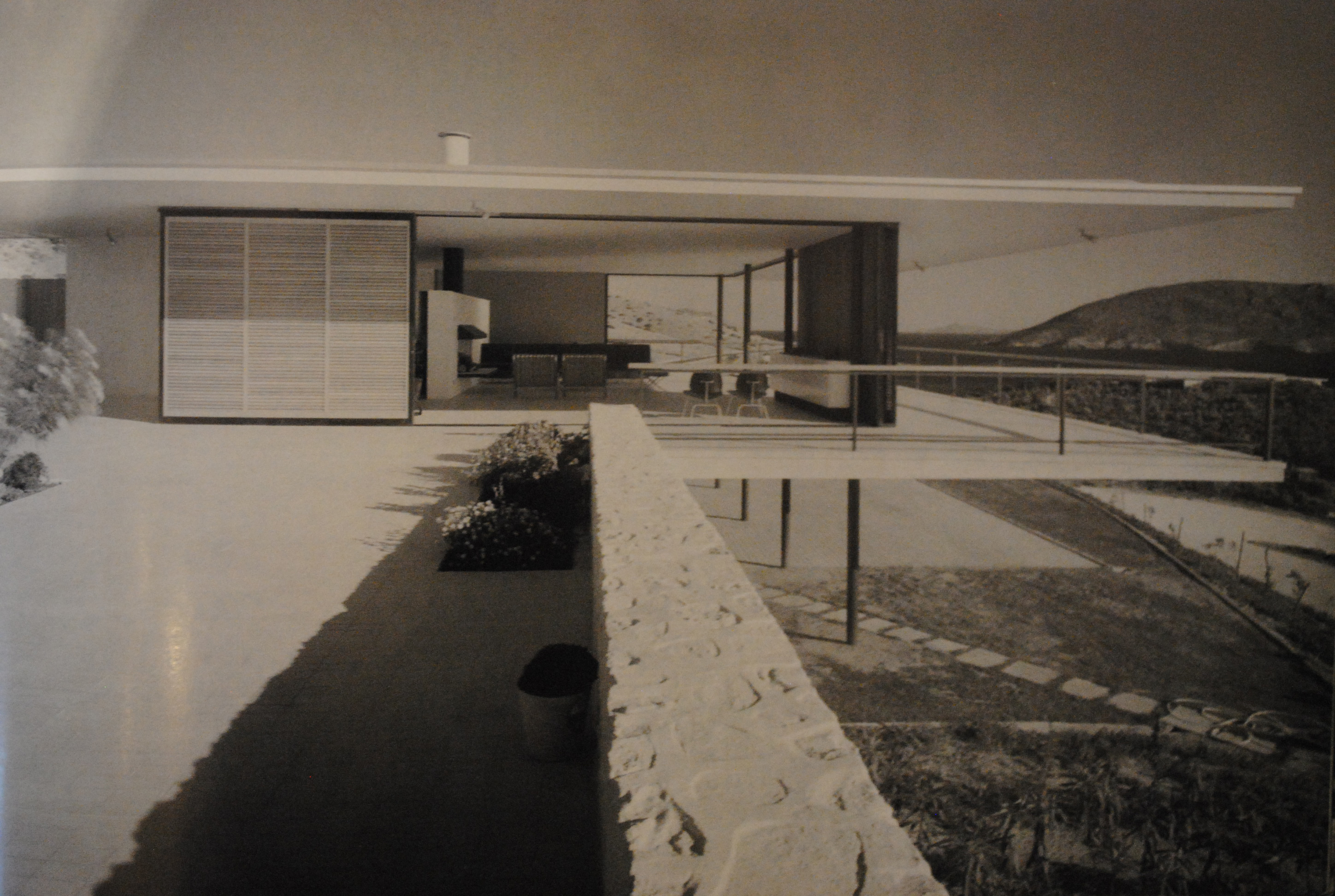 Φωτογραφία : Δημήτρης Καλαποδάς